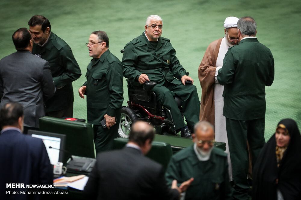 حضور نمایندگان مجلس شورای اسلامی ایران با یونیفرم سپاه پاسداران انقلاب اسلامی در جلسهٔ علنی ۲۰ فروردین ۱۳۹۸، به مناسبت روز پاسدار و در محکومیت اقدام دولت ایالات متحدهٔ آمریکا به قرار دادن سپاه پاسداران در فهرست گروه‌های تروریستی